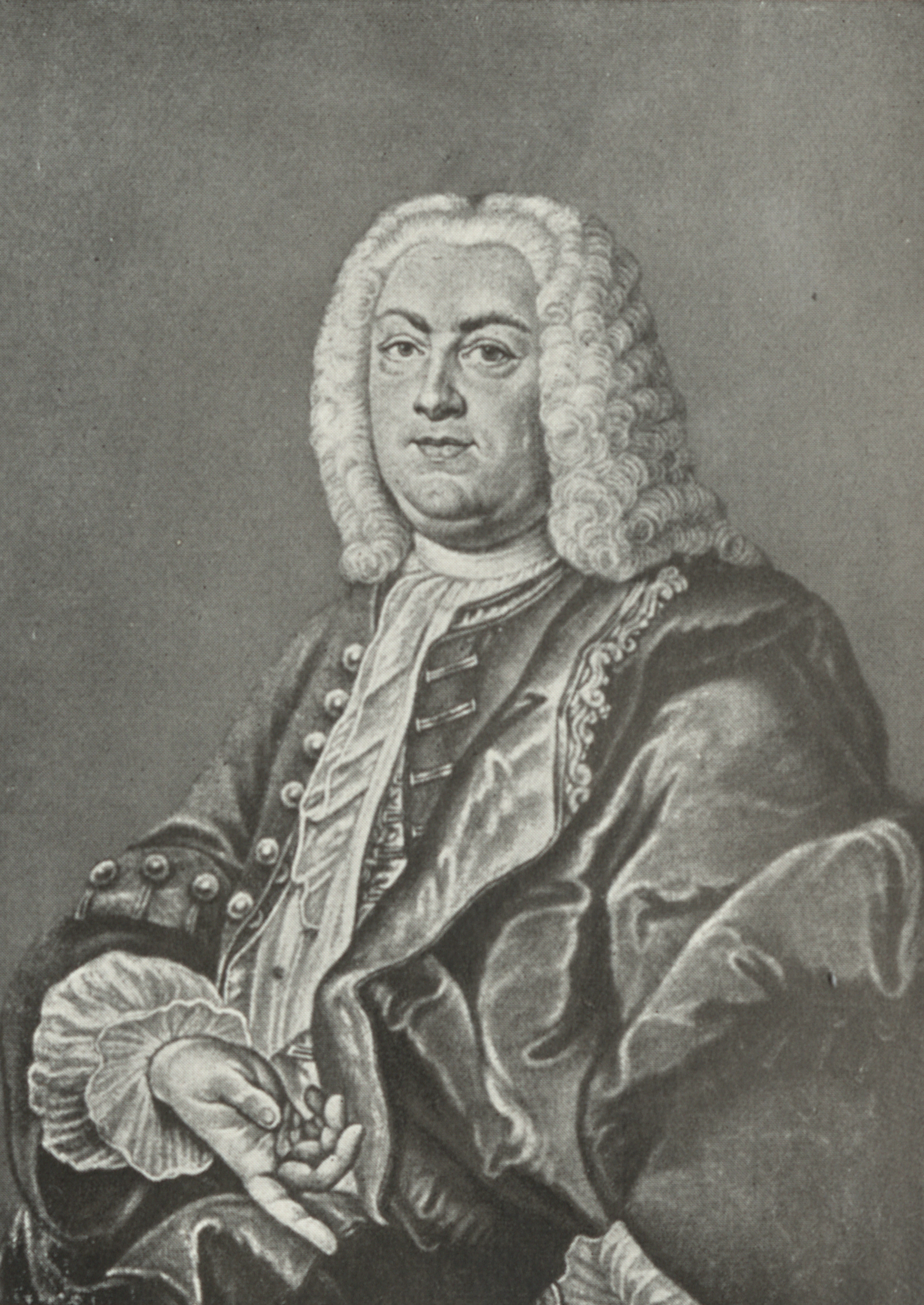 Johann Christoph Gottsched (1700-1766) , Professor der Logik und Metaphysik in Leipzig. Goethe hielt wenig von dem ehemaligen Literaturgewaltigen, den er mit seinem späteren Schwager Schlosser aufsuchte. Den Besuch schildert er mit viel Humor in "Dichtung und Wahrheit"